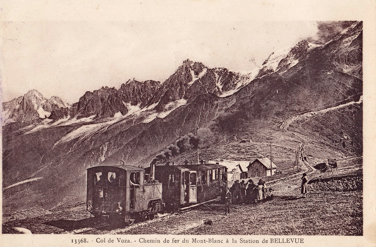 Carte postale ancienne éditée par Cigogne, n°13368 : COL DE VOZA - Chemin de fer du Mont-Blanc à la station de BELLEVUE